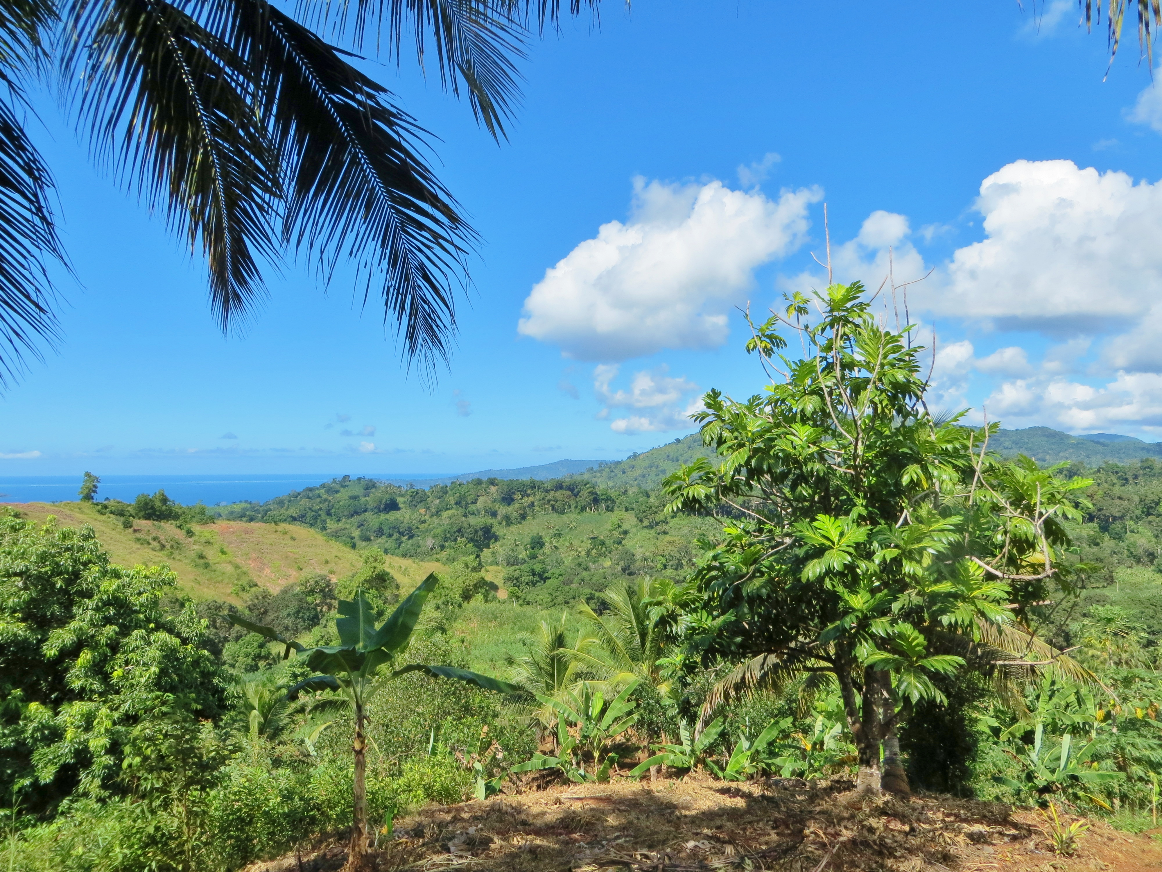 Un agro-paysage caractéristique à Mayotte, dans la région de Vahibé (près de Passamaïnty). On distingue les principaux arbres d'intérêt alimentaire de la région : cocotier (Cocos nucifera, au premier plan haut), bananier (Musa sp., au centre), arbre à pain (Artocarpus altilis, à droite), papayer (Carica papaya, plus loin à droite), manguier (Mangifera indica, à gauche), et champs de manioc (Manihot esculenta, dans la descente).